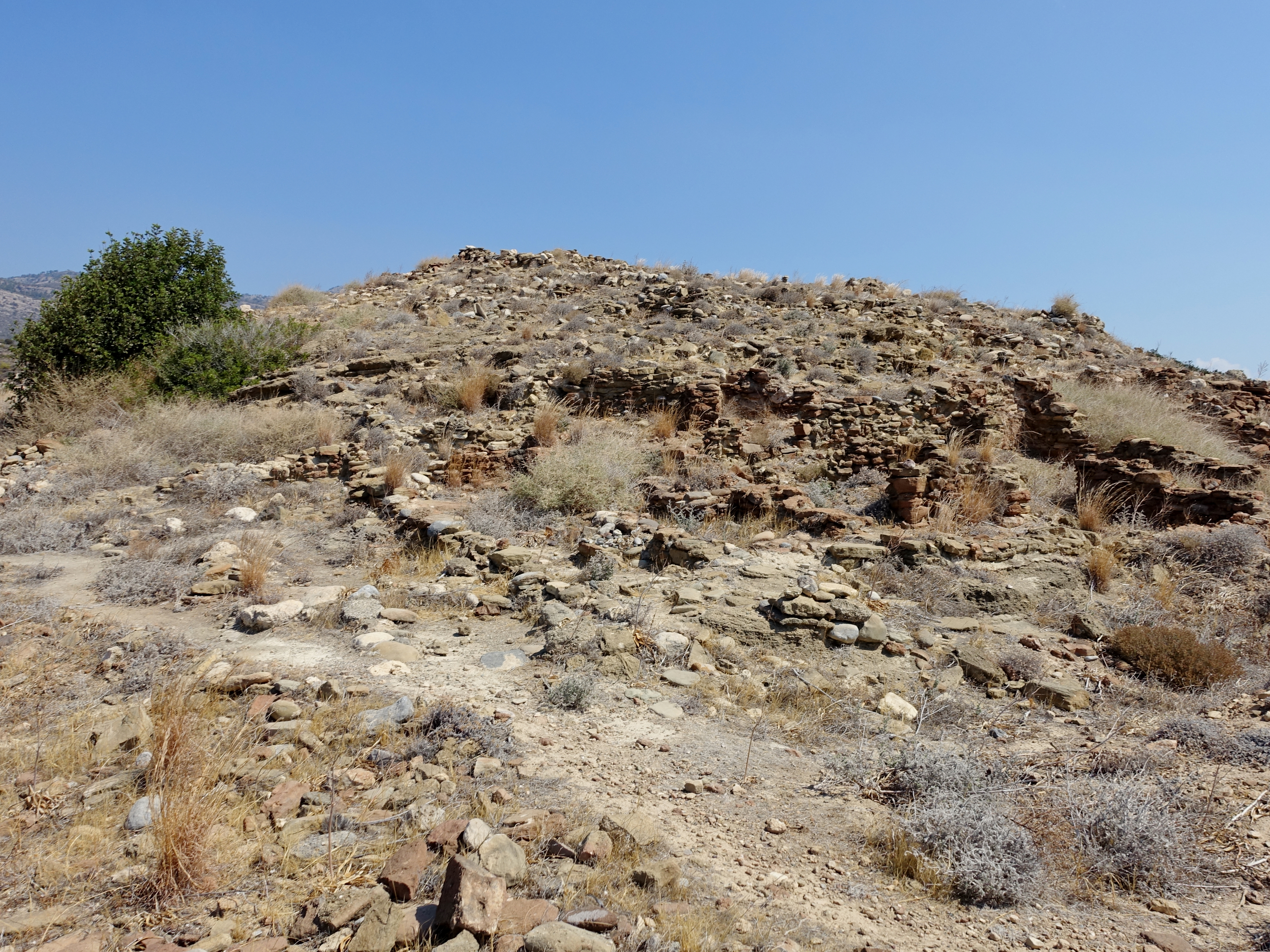 Ausgrabungsstätte von Fournou Koryfi bei Myrtos, Kreta, Griechenland